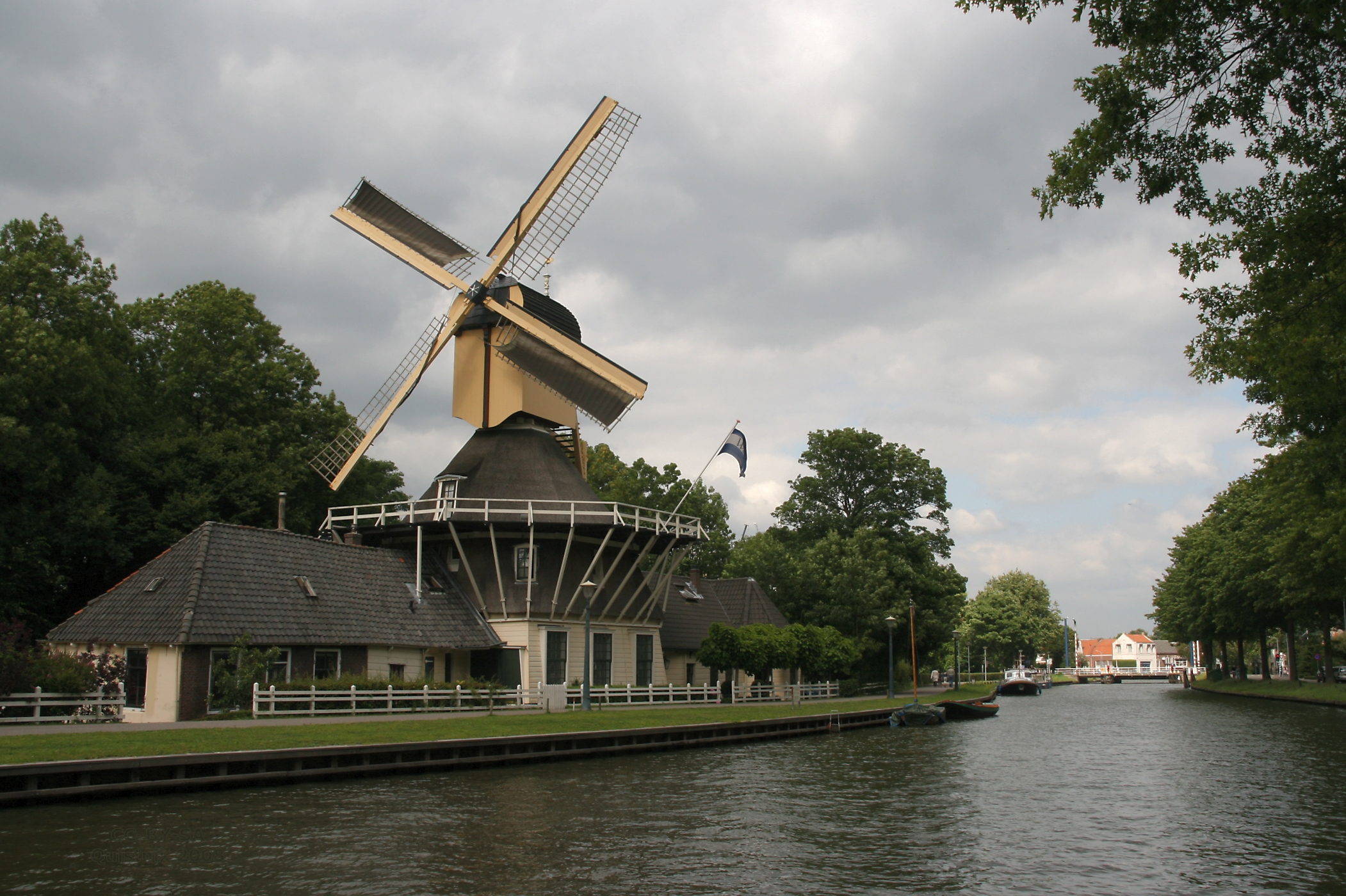 Weeap: molen 't Haantje met 2 zeilen, gezien vanaf de overzijde van het water